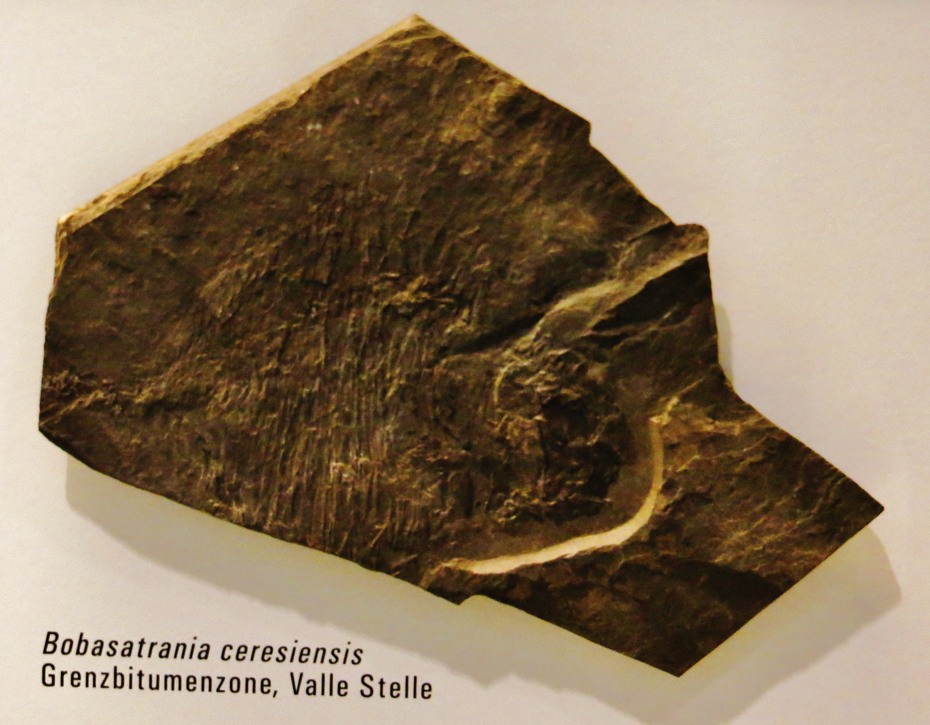 Fossil - Took the picture at Museum of Natural History Zurich